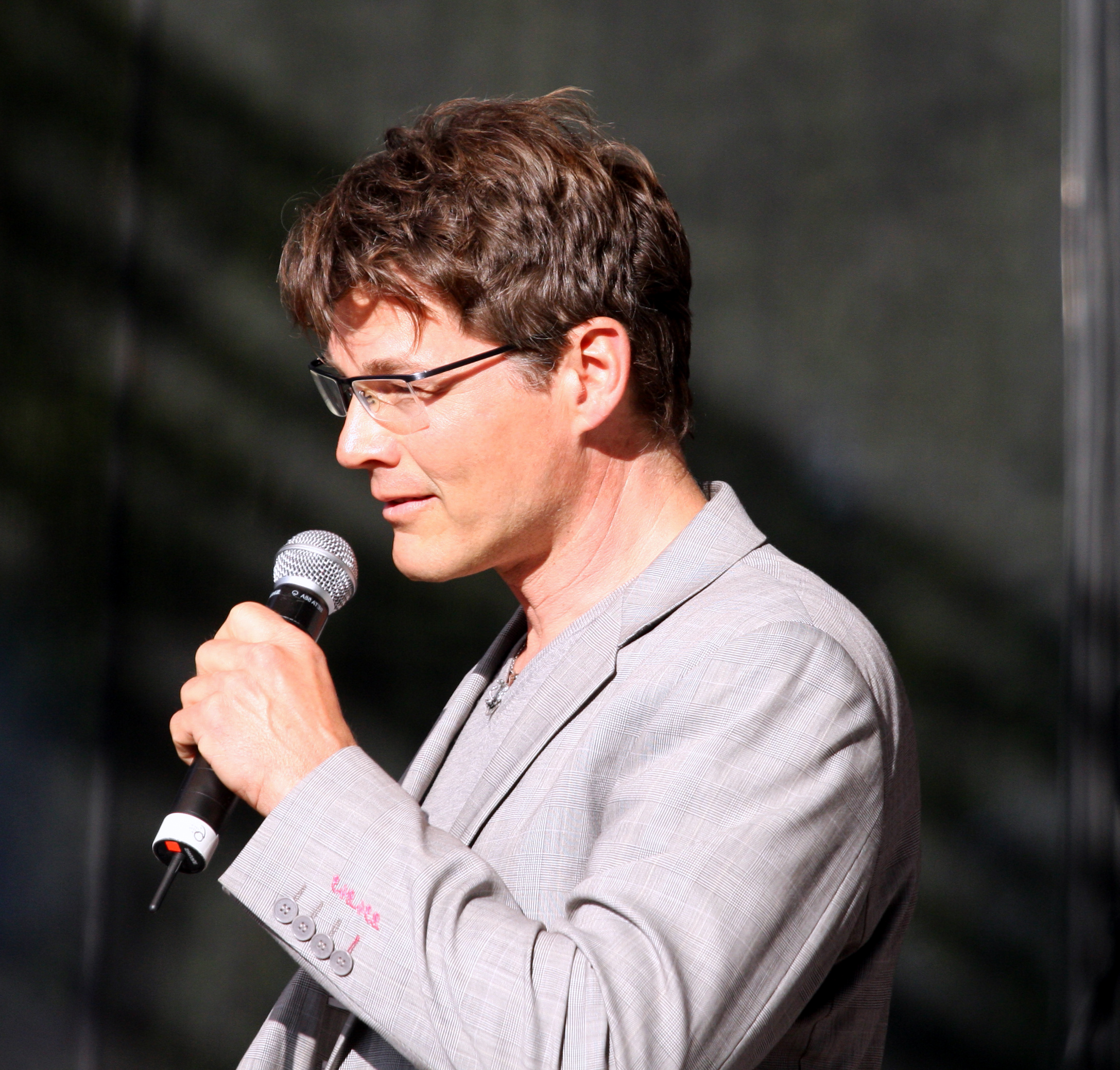 Morten Harket in Stavanger 2010